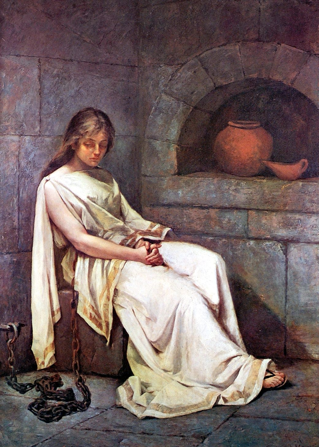 Agripina Metella encadenada, oleo sobre tela, 200 x 143 cm, Banco Chile, Chile